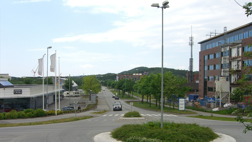 Vassbotnen in Sandnes, Norway